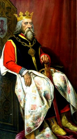 Retrato imaginario del rey Sancho III de Castilla (1134-1158). Fue hijo del rey Alfonso VII de León y de la reina Berenguela de Barcelona. Sancho III reinó en Castilla durante un año y falleció en 1158. Fue sucedido por su hijo, Alfonso VIII de Castilla.